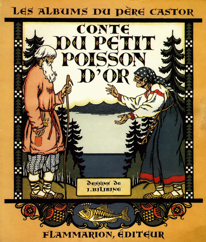 Обложка книги "Сказка о рыбаке и рыбке"